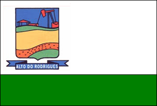 Bandeira de Alto do Rodrigues, Rio Grande do Norte, Brasil.